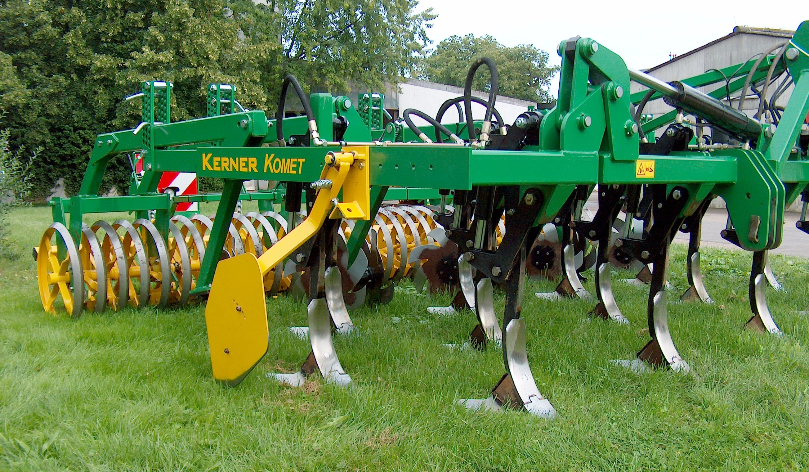 Sternradgrubber Kerner Komet, Bj. 2004, dreibalkig und 14-zinkig mit einer Arbeitsbreite 4,2 m, auf Straßenbreite (3m) hydraulisch klappbar